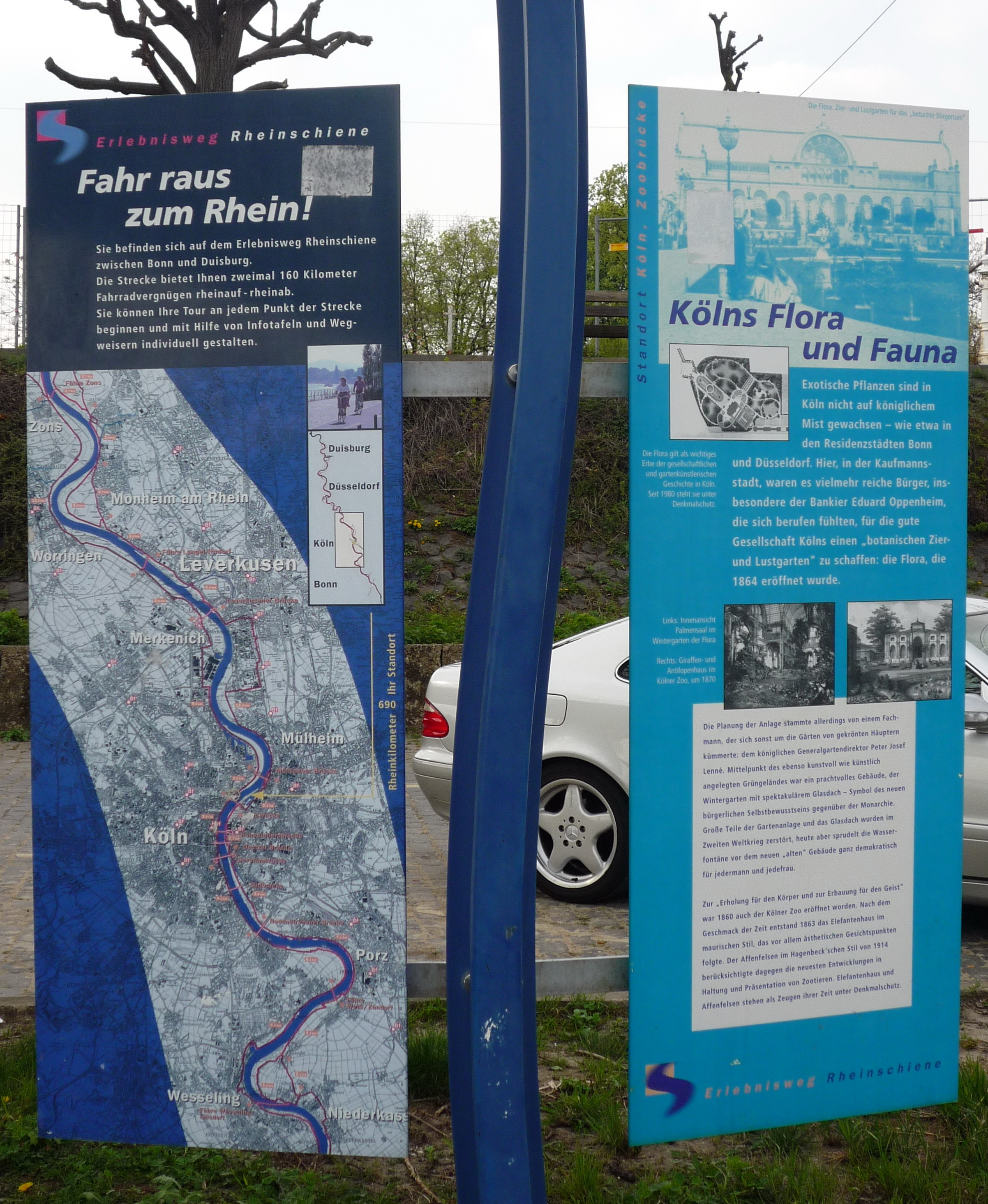 Erlebnisweg Rheinschiene in Köln, Informationstafel Flora